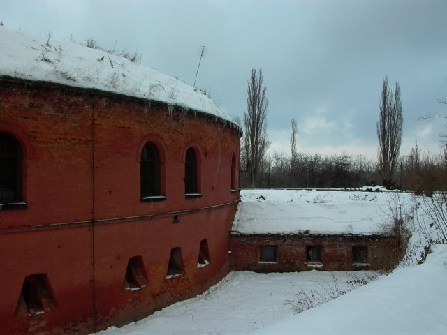 Zdjęcie przedstawia działobitnię Fortu Władimira (Legionów) Cytadeli Warszawskiej, z widoczną fosą i korytarzem do przeciwskarpy. Autor: Zbigniew Strucki. Wykonano: 30.I.2007